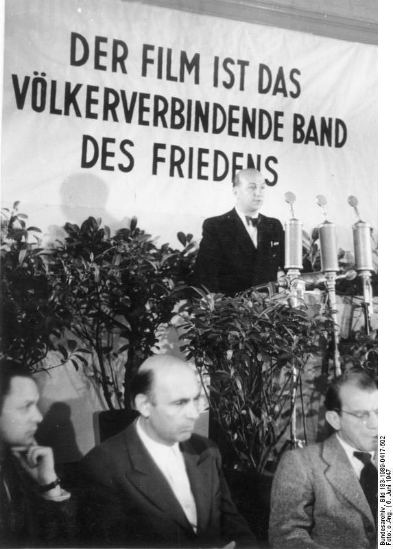 ADN-ZB/ Illus Erster deutscher Film-Autoren-Kongreß Im Hause des Kulturbundes [in Berlin] wurde am 6. Juni [1947] der "Erste Deutsche Film-Autoren-Kongreß" mit über 100 Kongreßteilnehmern und im Beisein von Vertretern der Besatzungsmächte eröffnet. UBz: Leiter der Defa, Lindemann, bei seinem Referat.